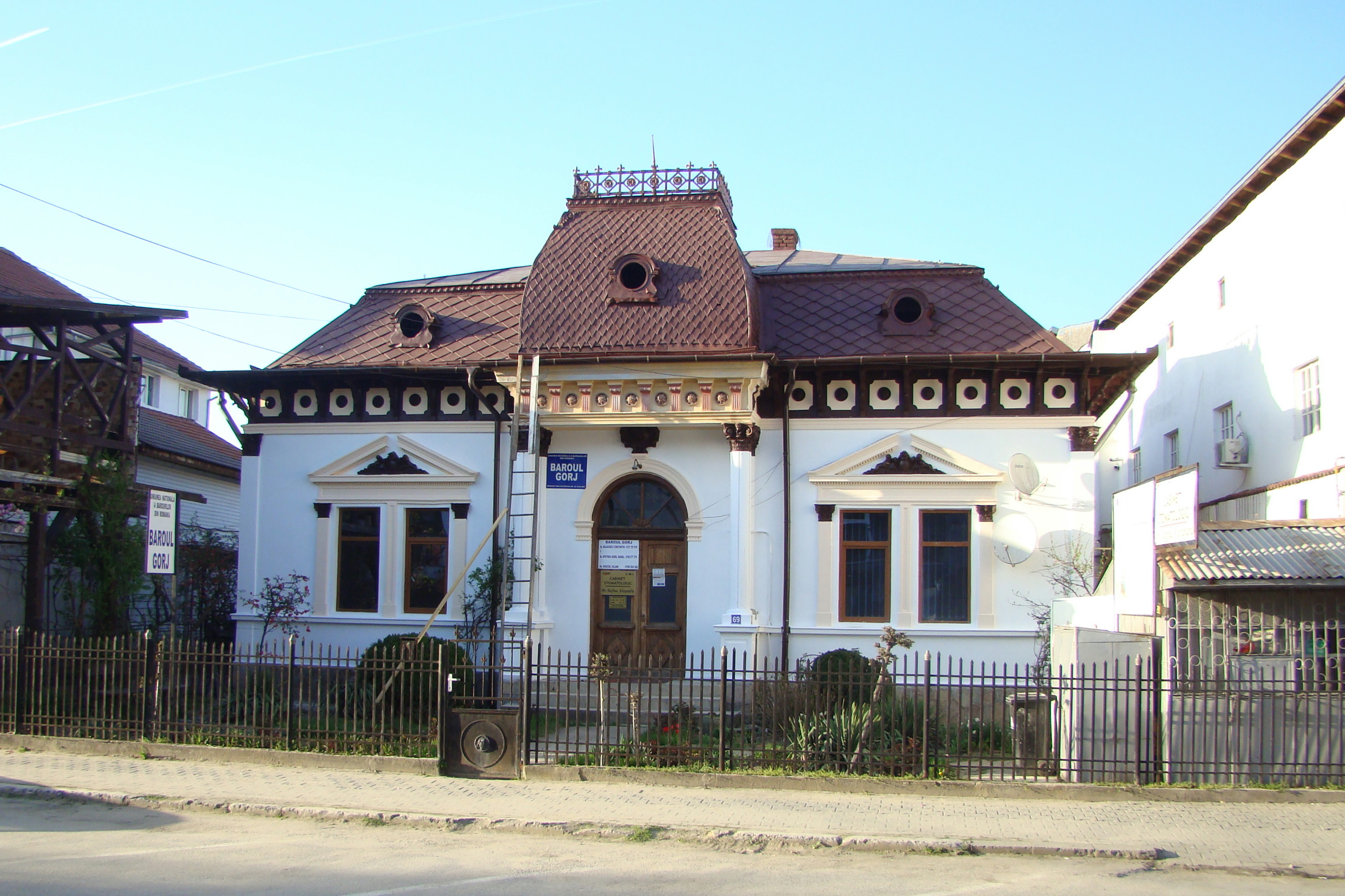 Ansamblu urban, municipiul Târgu Jiu, str. Traian, Vladimirescu T., Unirii, Grivița, Calea ferată, Calea Eroilor